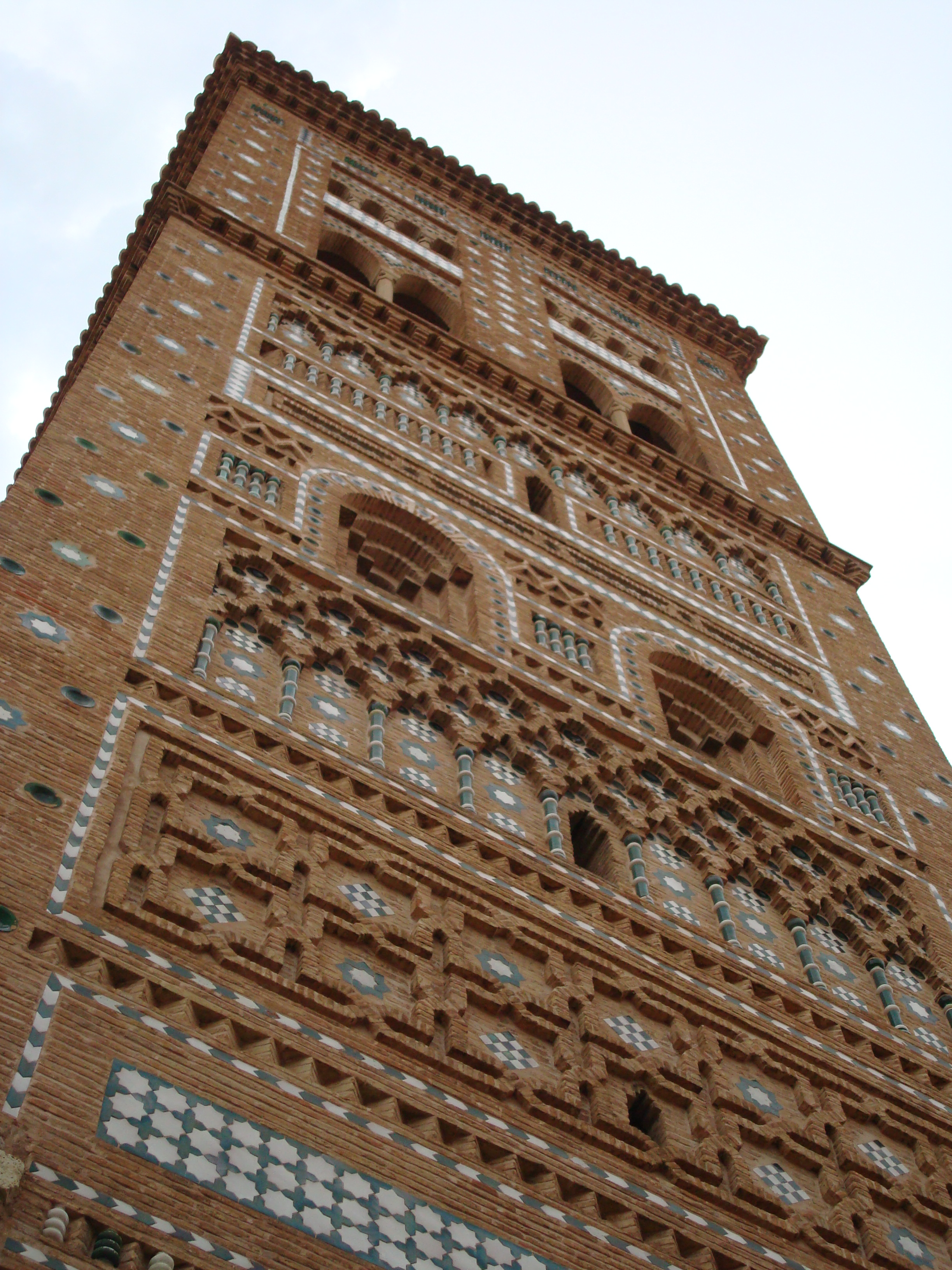 Detall de la façana d'una torre mudèjar de Terol. La torre té un lleuger grau d'inclinació, cosa que provoca que la fotografia no estigui completament centrada.